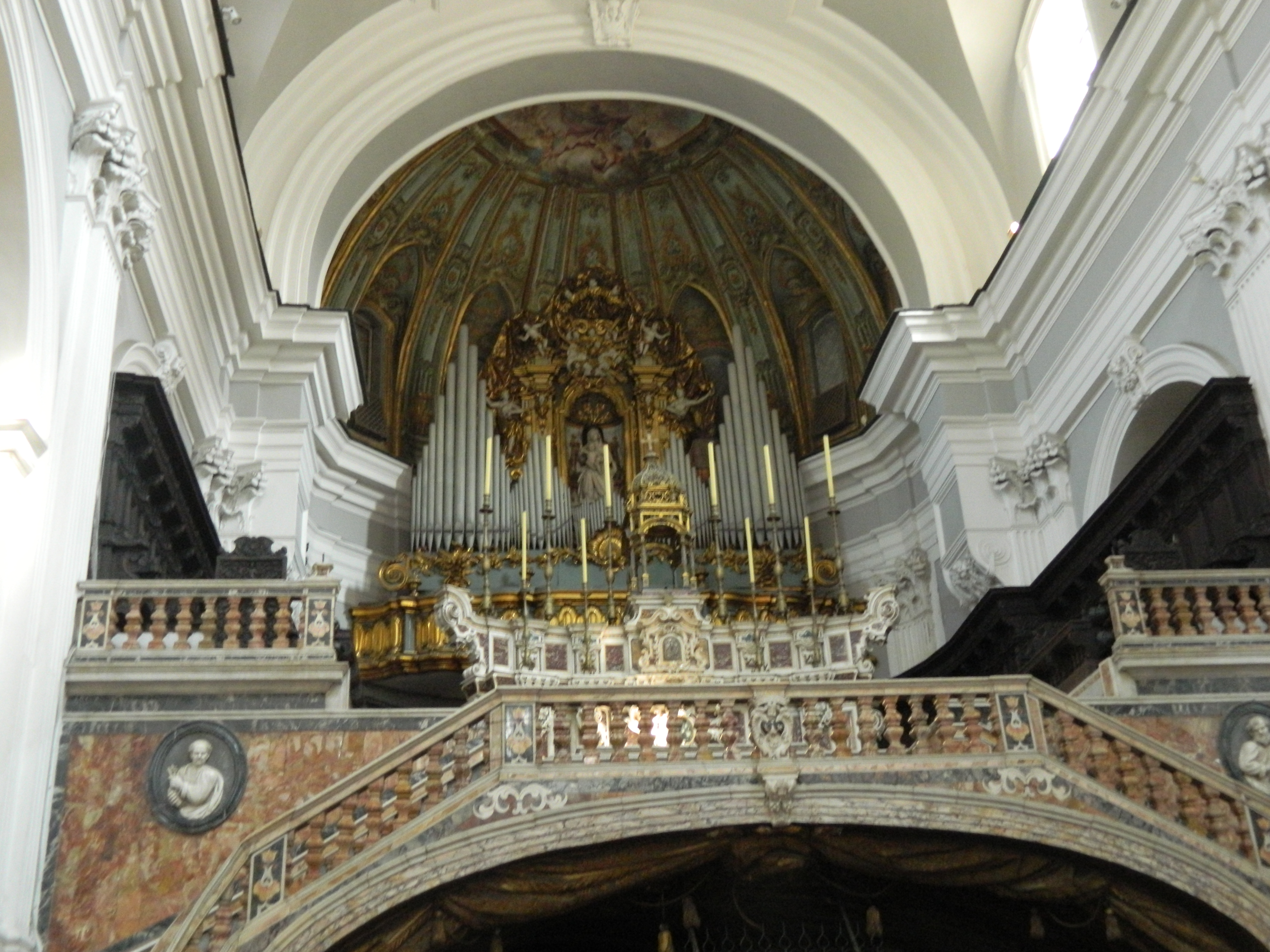 Basilica di Santa Maria della Sanità (Napoli)